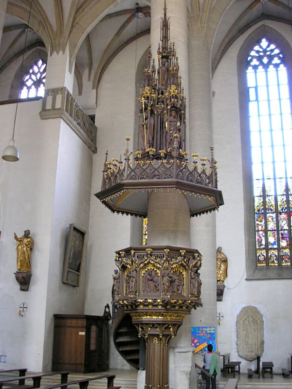 Dom zu Eichstätt (Oberbayern). Die neugotische Kanzel. Eigene Aufnahme, April 2007 / Eichstaett cathedral (Upper Bavaria, Germany). The neogothic pulpit. Own photo, April 2007